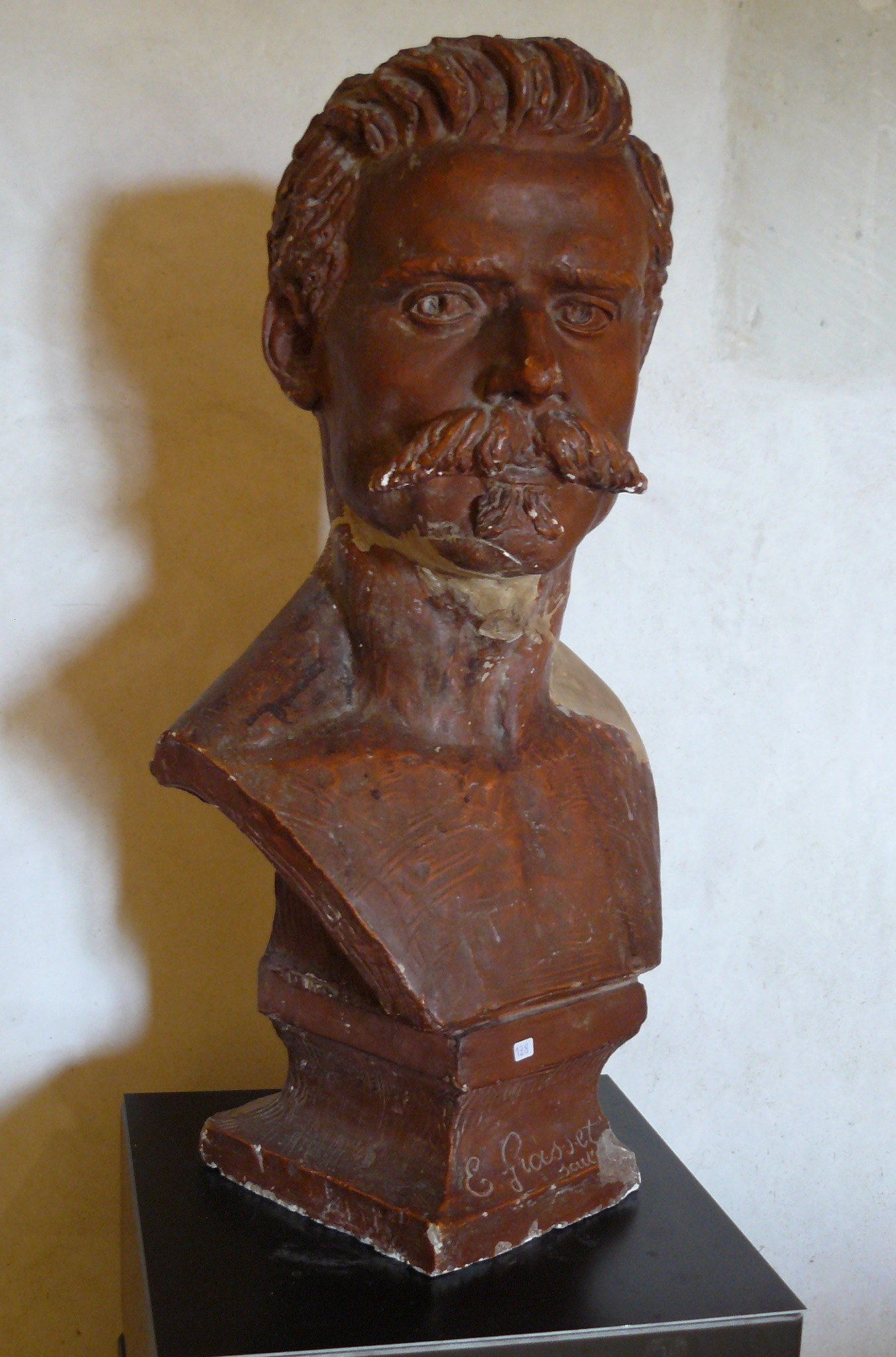 Attribué à Edmond Grasset (1852-1880) Autoportrait présumé, vers 1878, localisation inconnue.